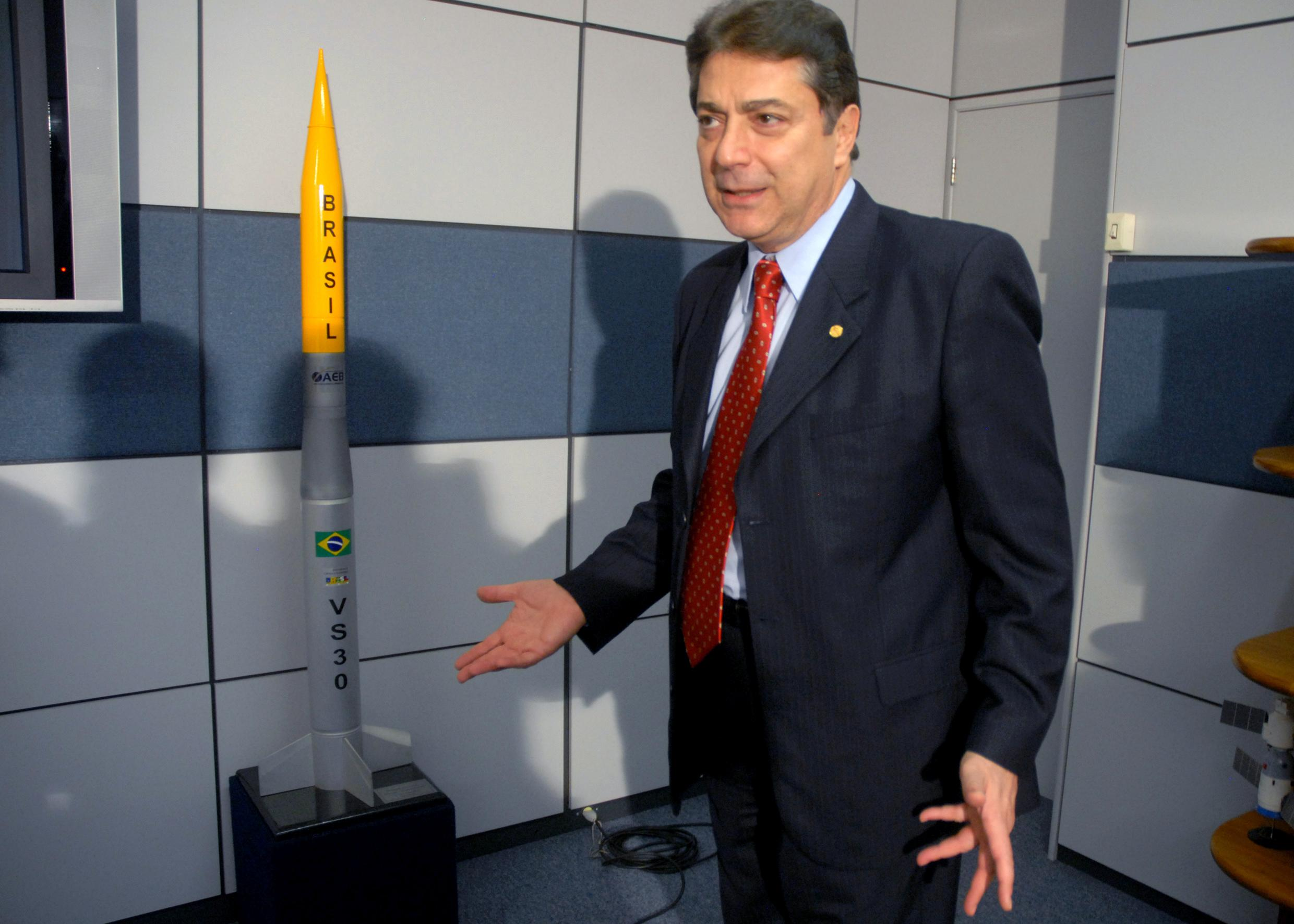 El presidente de la Agencia Espacial Brasileña Carlos Ganem, con una maqueta del VS-30